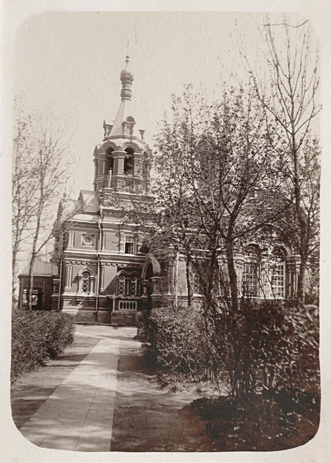 Беларуская (тарашкевіца): Менск (Miensk), Доўгі Брод (Doŭhi Brod). Царква-мураўёўка Аляксандра Неўскага на Вайсковых могілках